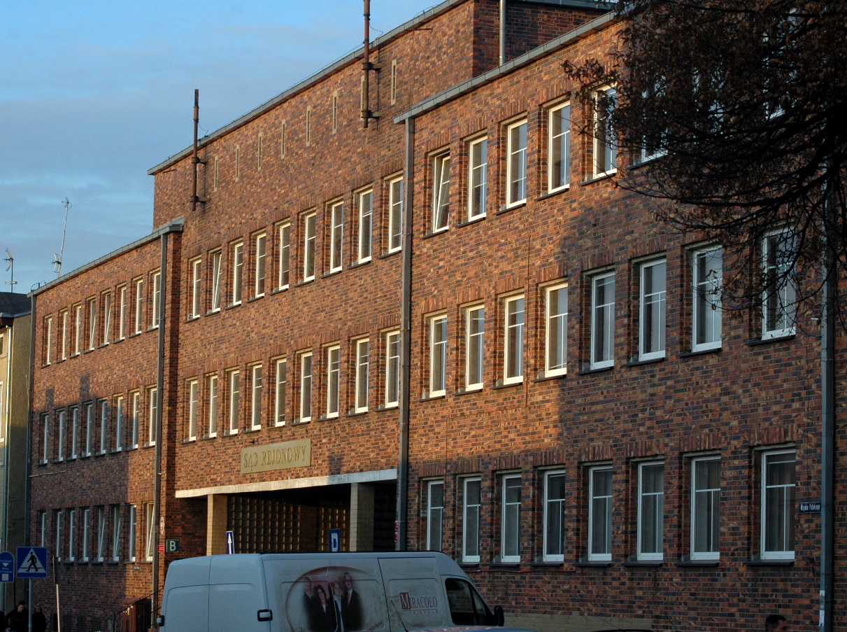 Sąd REjonowy w Stargardzie Szczecińskim.